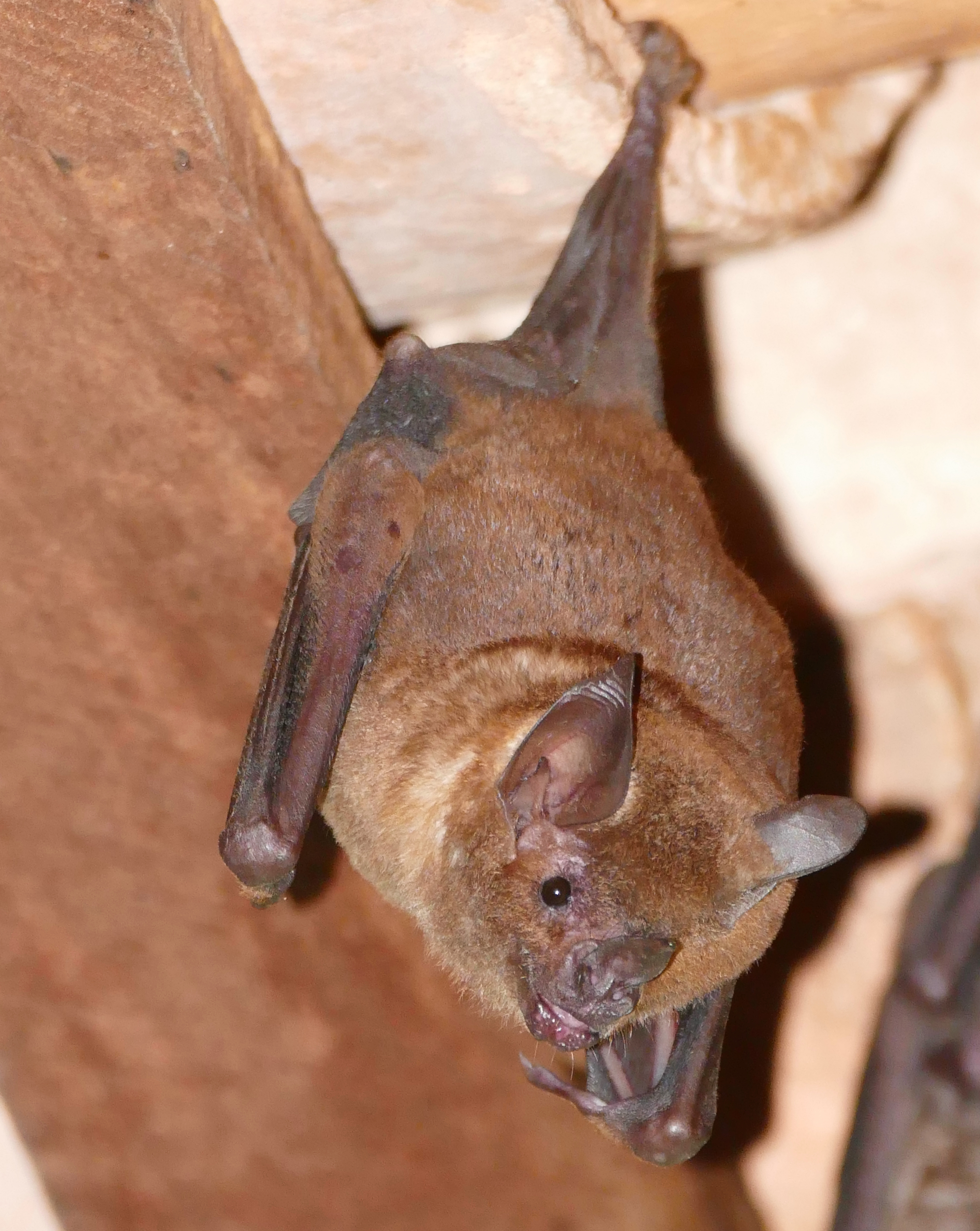 Transpantaneira, Poconé, Mato Grosso, BRAZIL